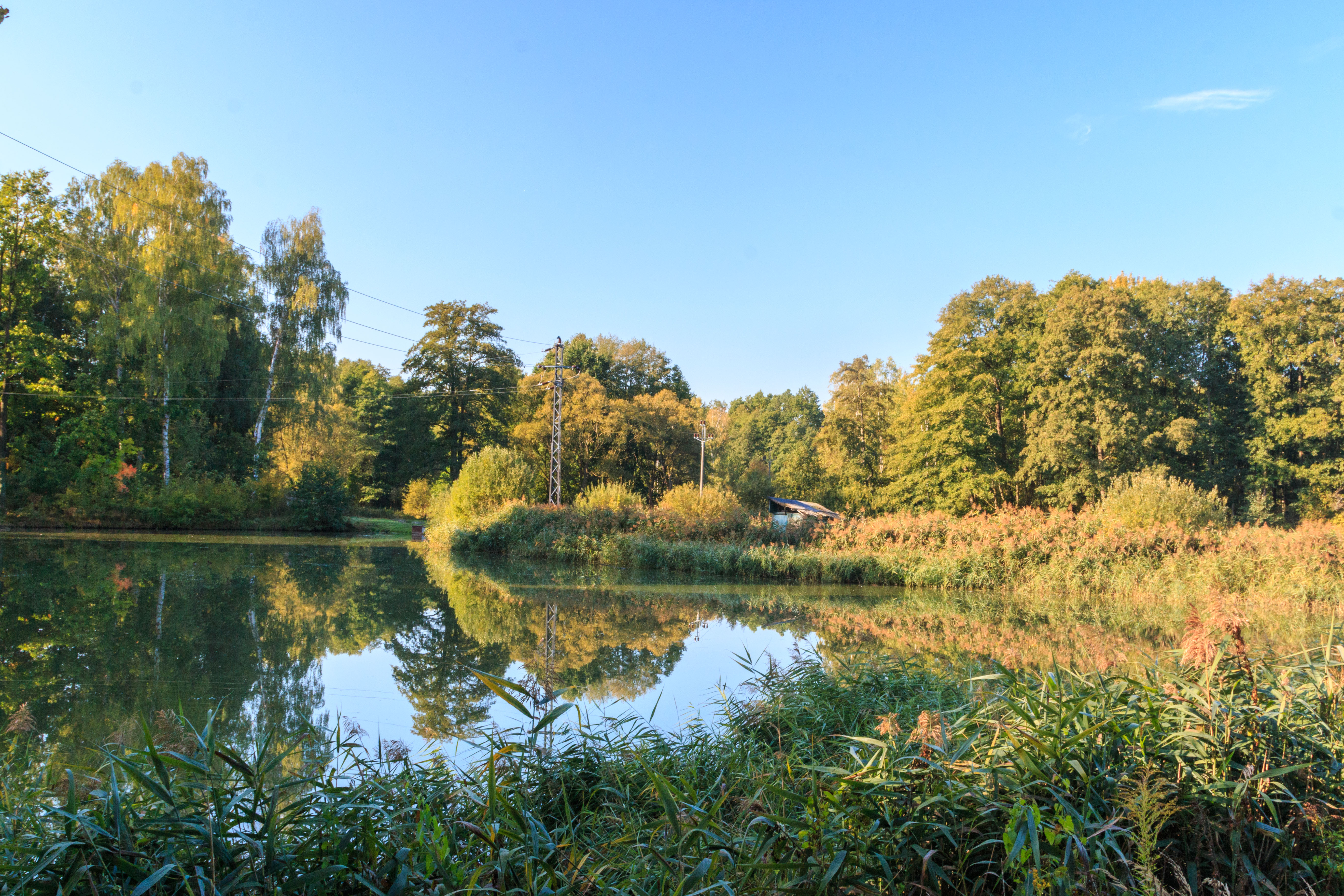 Mimoňské rybníky Project: Vodstvo.